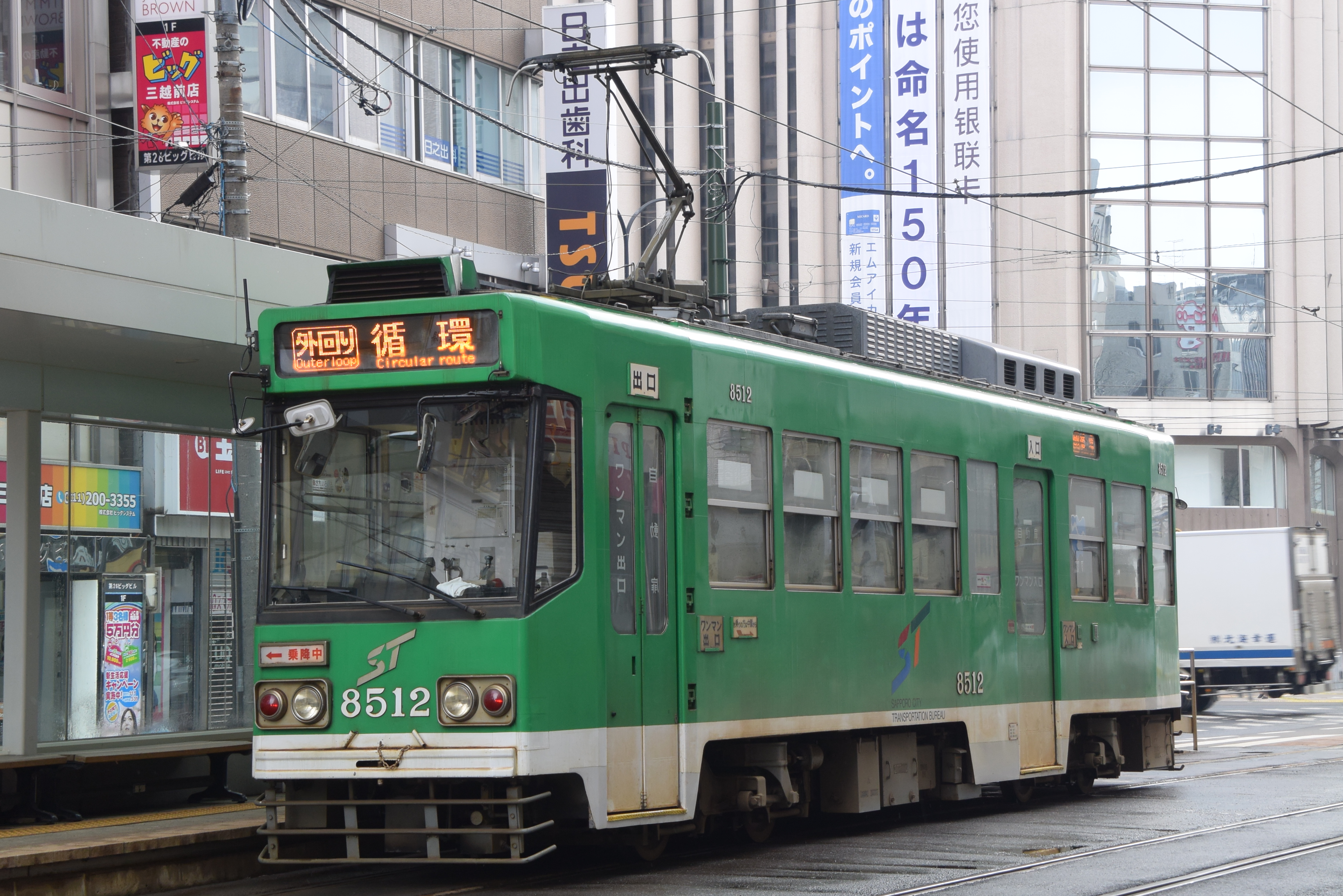 西４丁目停留所にて撮影